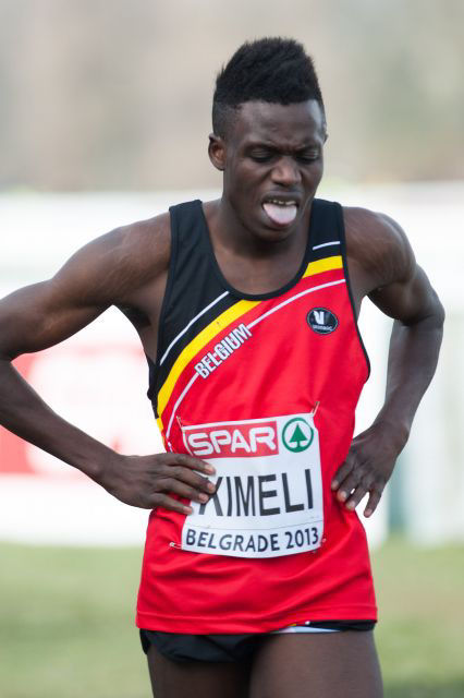 Isaac Kimeli tijdens het EK Cross 2013